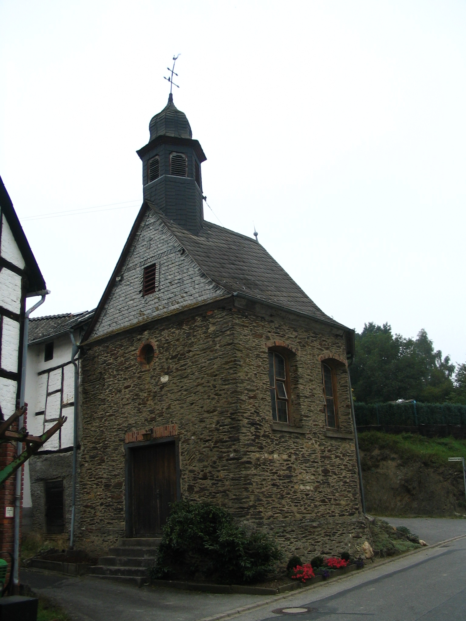 Anna-Kapelle in Belgweiler im Hunsrueck